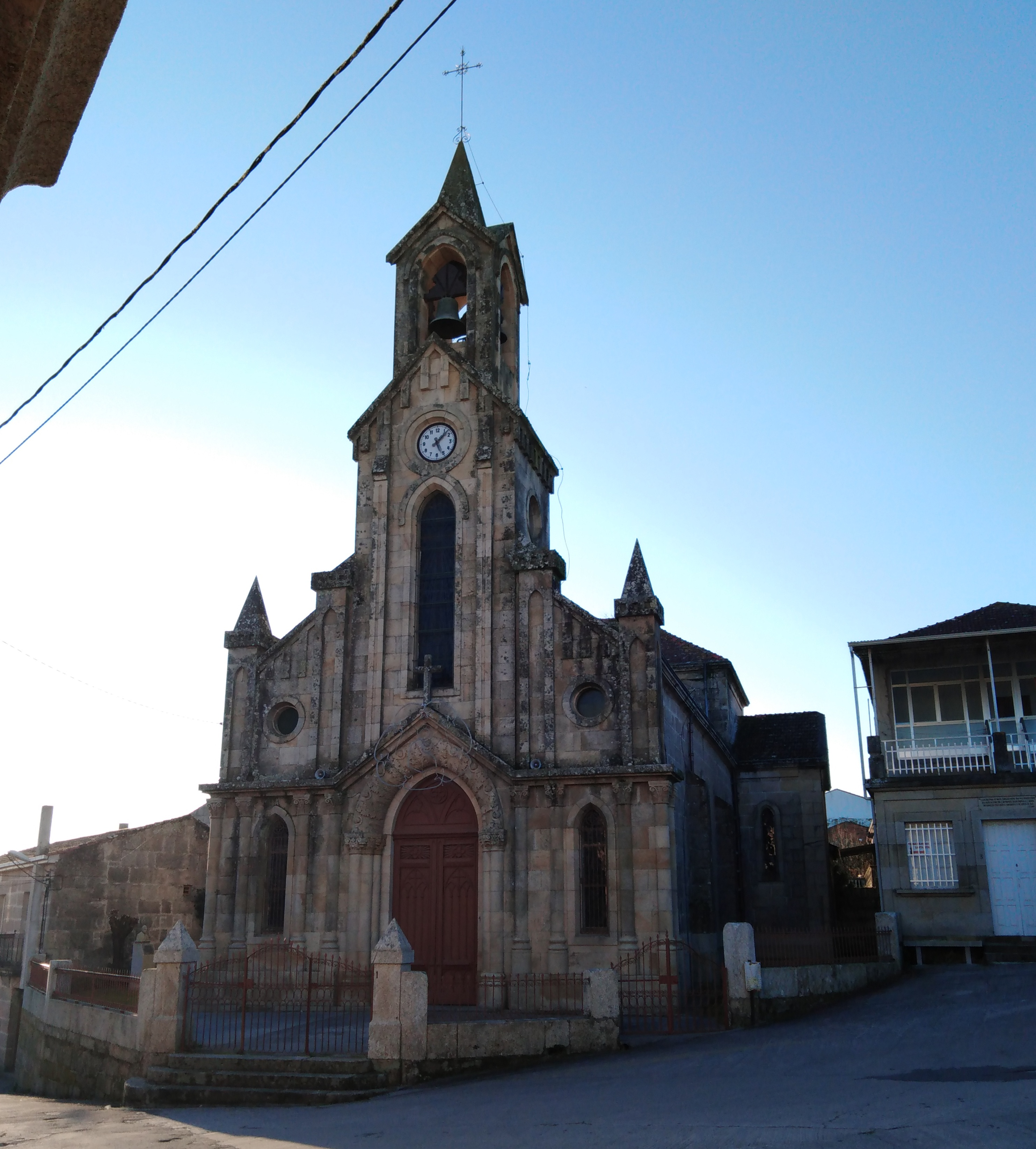 Igrexa da parroquia de Amarante, na vila de Dacón